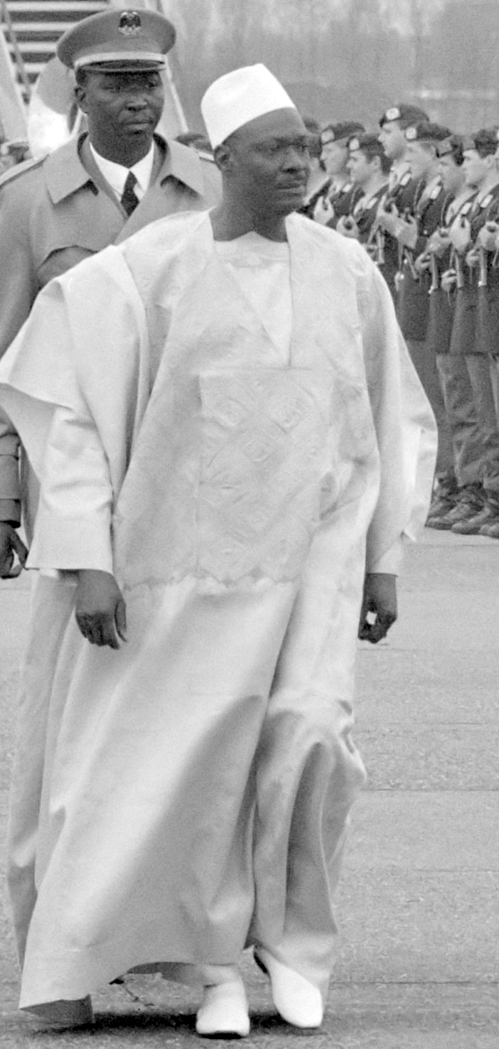 President Moussa Traore van Mali komt aan op luchthaven Zestienhoven